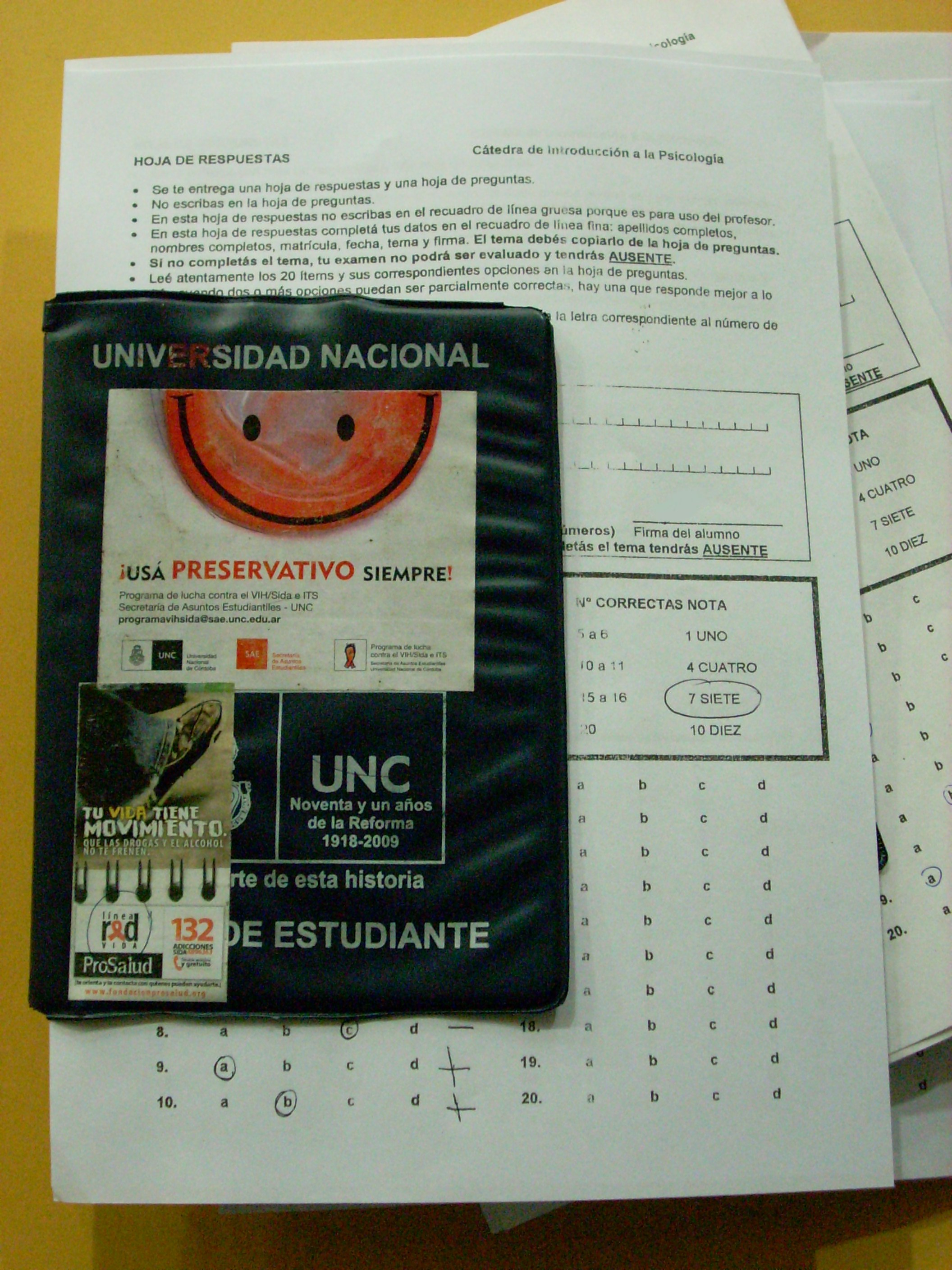 Universidad Nacional de Córdoba Facultad de Psicología Libreta y examenes